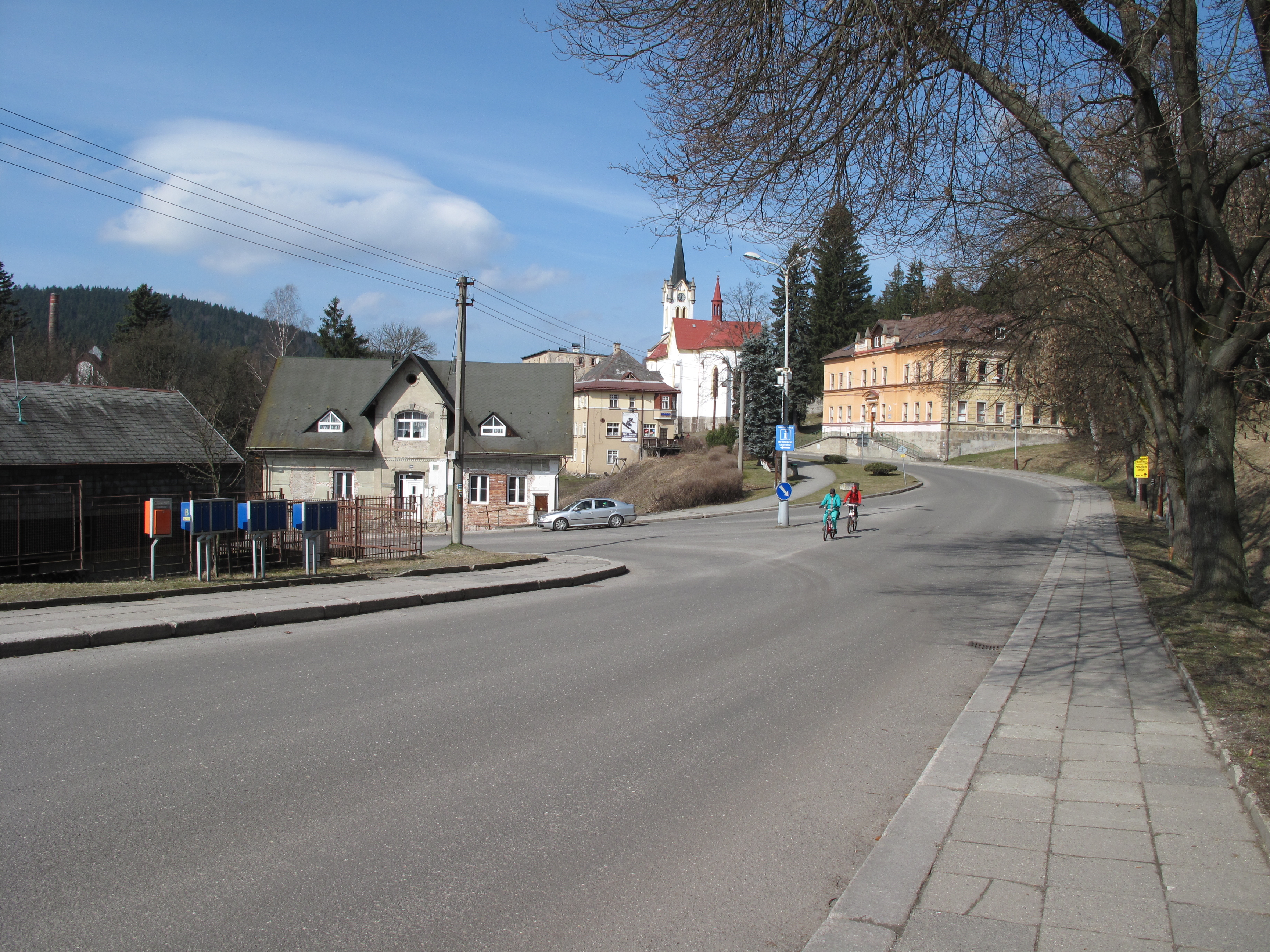 Křižovatka v Josefově Dole. Okres Jablonec nad Nisou, Česká republika.